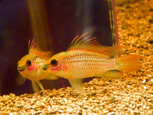 Apistogramma eremnopyge